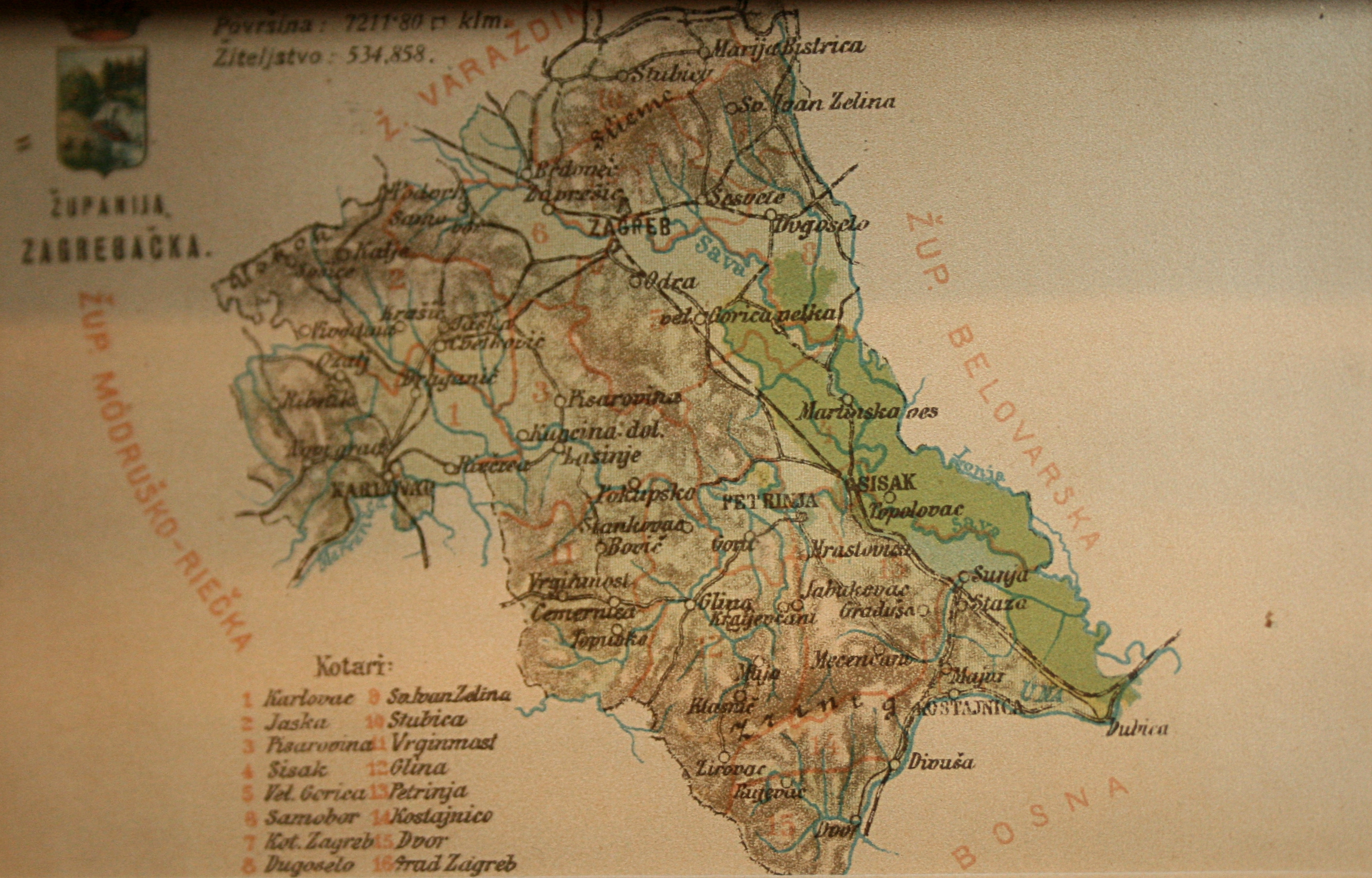 Zemljovidi županija na razglednicama, snimljeno tijekom Noći muzeja